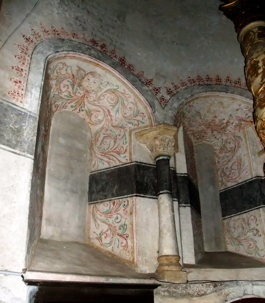 Quintenas église fresques